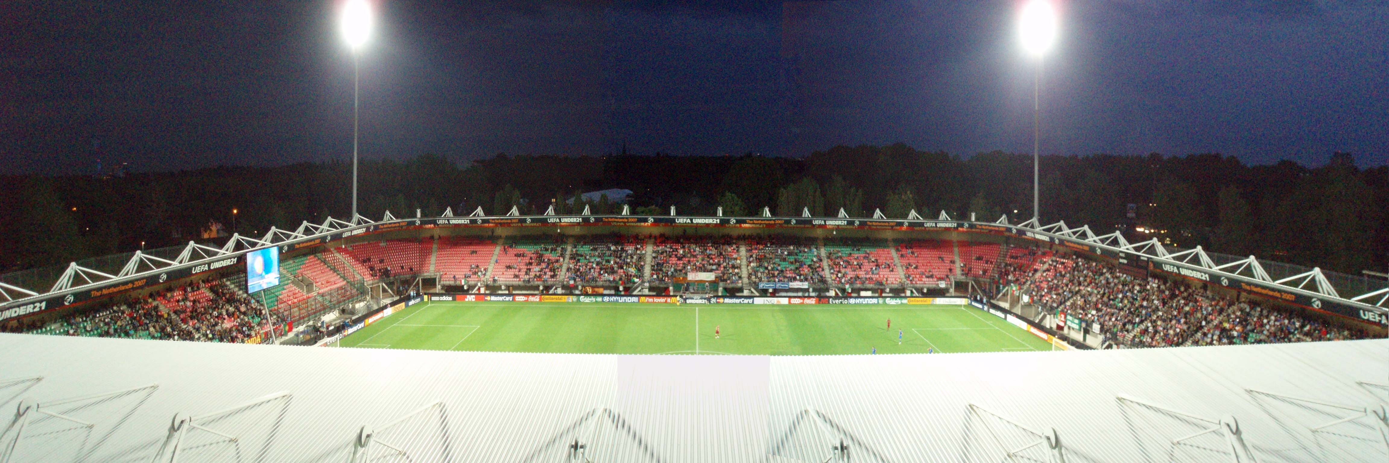 Goffert stadium Nijmegen